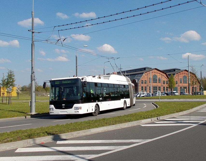 SOR TNB 18 u Trojhalí